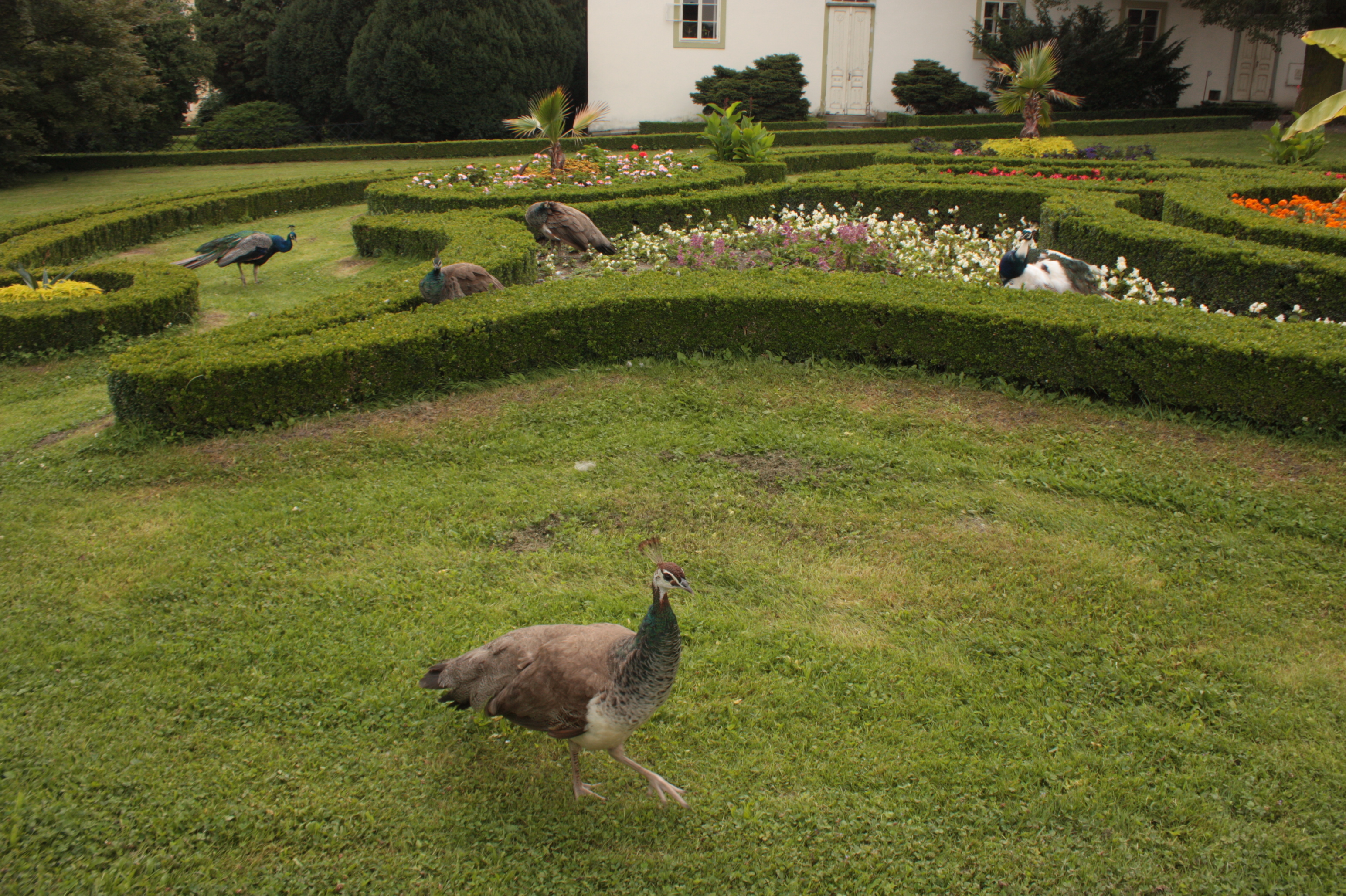 Kroměříž, Podzámecká zahrada